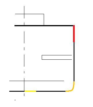 Schematischer Teilquerschnitt des Hauptspants mit Schergang (rot), Kimmgang (orange) und Kielgang (gelb)